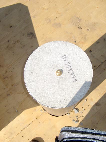 Der Grundstein des A94 Abschnitts